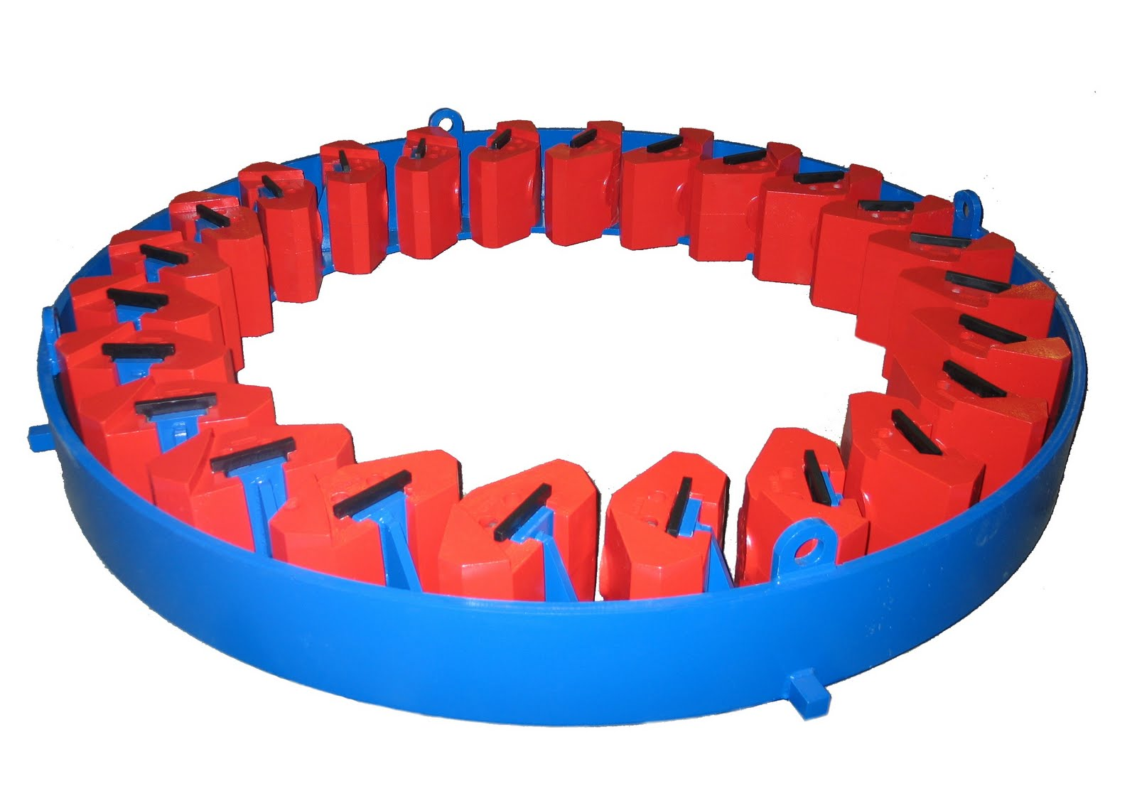 Используется для повышения степени сокращения при центробежно-ударном дроблении